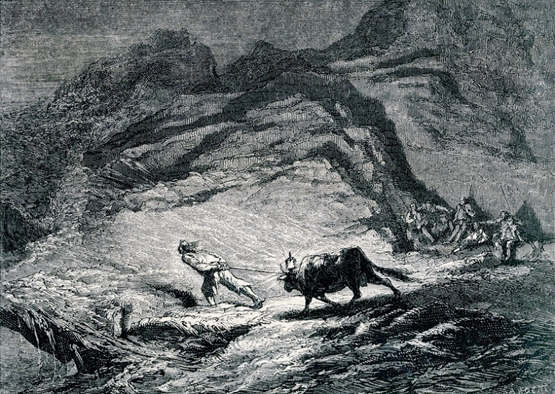 Yan' Dargent : Les pilleurs de la mer [à Guissény] (étude préparatoire à une œuvre disparue qui a été exposée au Salon de Paris en 1861).